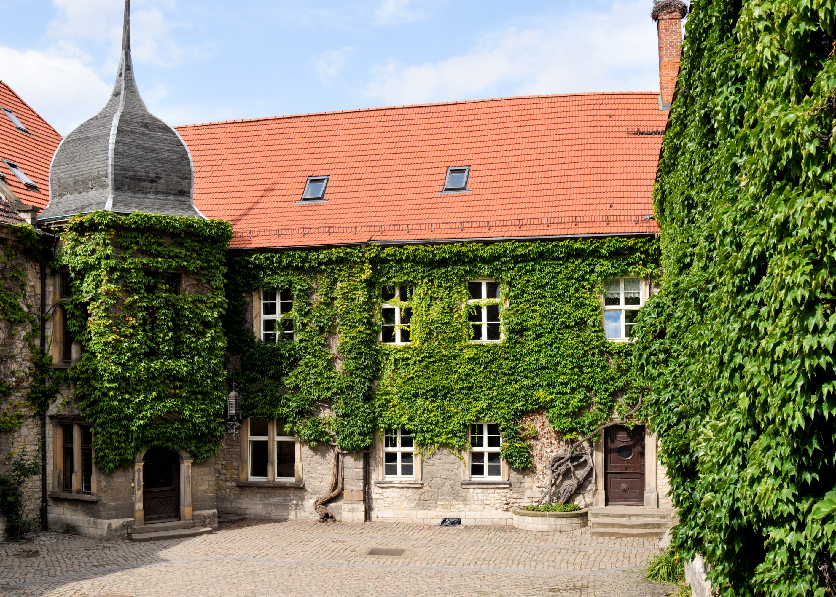 Zu sehen ist der Innenhof des ehemaligen Klosters, welcher heute den Schülerinnen und Schülern der Internatsschule Hadmersleben als Schulhof dient.